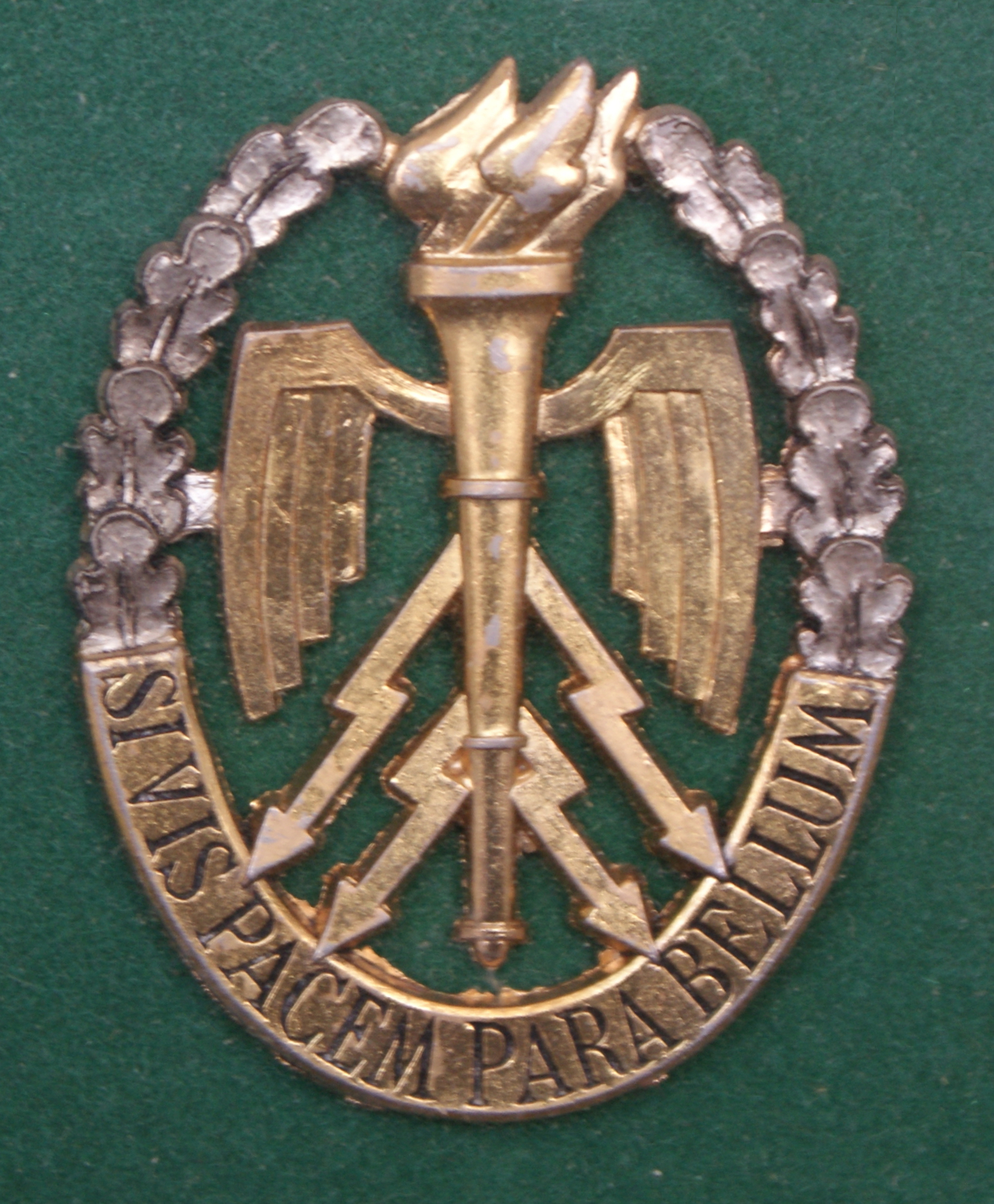 Insigne du CDEC - Paris - Insigne personnel porté lors de mon stage ORSEM à l'école militaire de Paris (1982). Ancien insigne de l'école supérieure de Guerre et actuel insigne de l'école de Guerre-Terre et du Centre de Doctrine et d’Enseignement du Commandement (CDEC). L'insigne porte la devise latine «Si vis pacem, para bellum» (Si tu veux la paix, prépare la guerre). Depuis 2019, sur proposition du CDCE, le service historique de la défense a homologué une version déclinée en trois couleurs, de l'argent au doré, pour un insigne de poitrine dont la version tout argent pour les diplômés de l’enseignement militaire supérieur auquel peuvent prétendre les ORSEM.